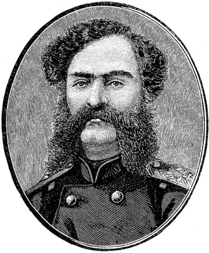 General I. G. Amilakhvari